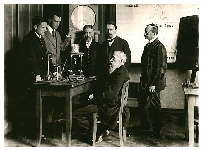 Introspektionsexperimente in Leipzig